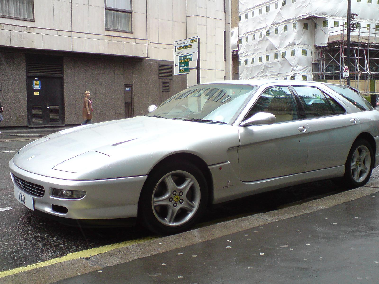 Ferrari 456E (Estate)